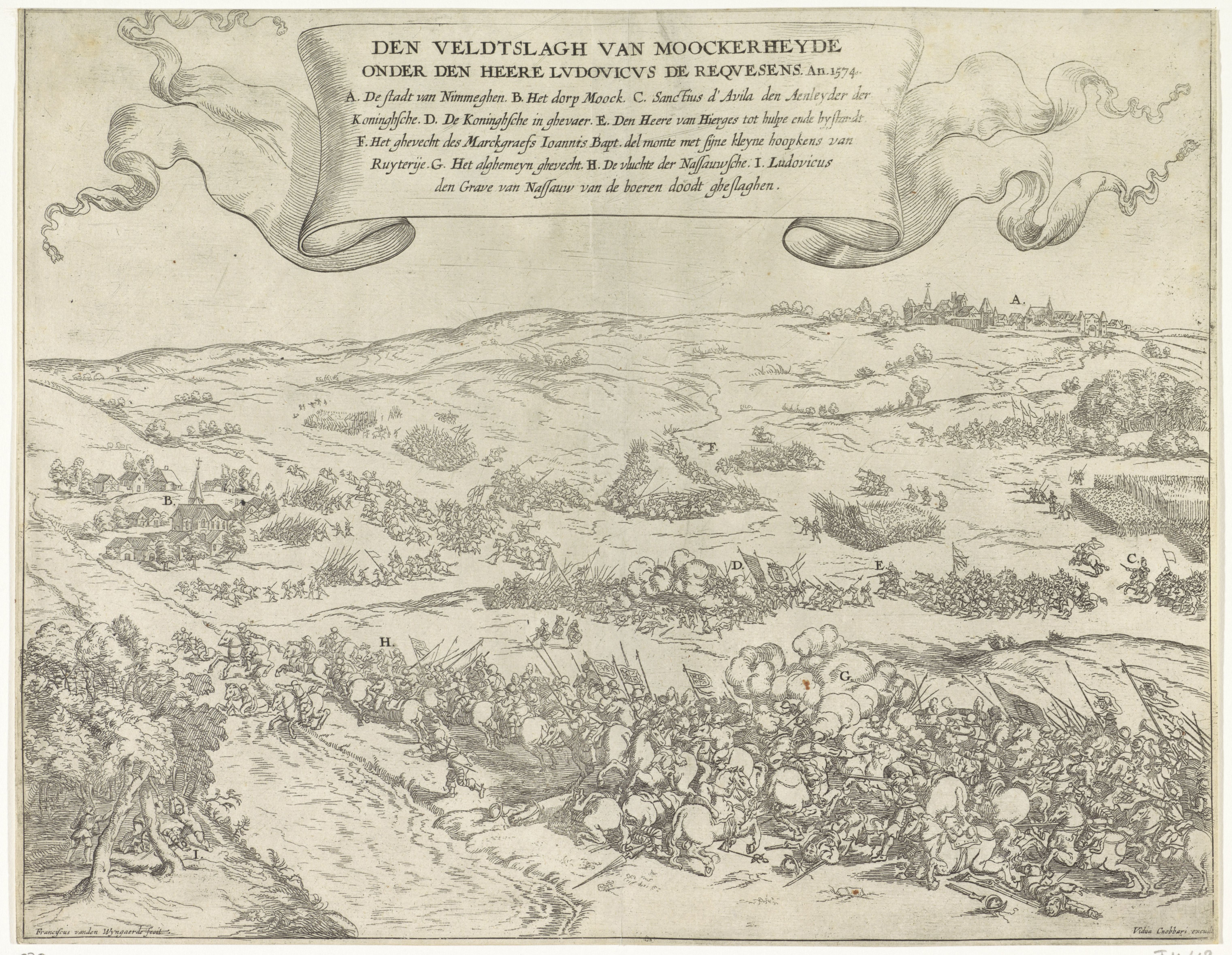 Batalla de Mook por Graaf Hendrik De Slag op de Moockerhei op 14 april 1574 waar graaf Lodewijk van Nassau (1538-1574) en zijn broer Graaf Hendrik(1550-1574) van Nassau Sneuvelden. Het was een grote nederlaag voor Willem van Oranje